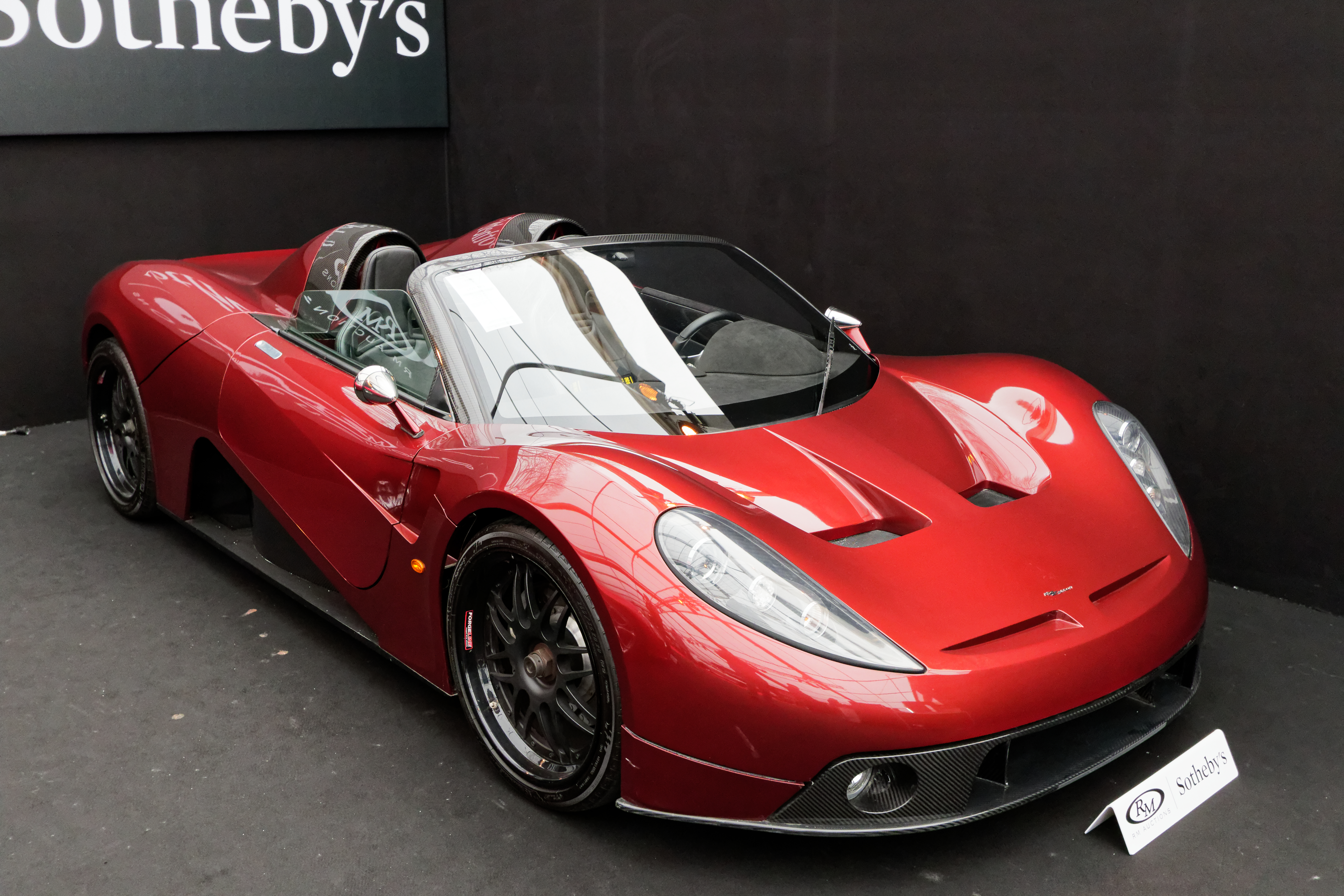 Un véhicule exposé lors de la vente RM Sotheby’s 2018 aux Invalides à Paris.